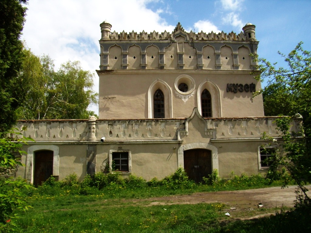 Синагога, Гусятин, вул. Пушкіна, 15